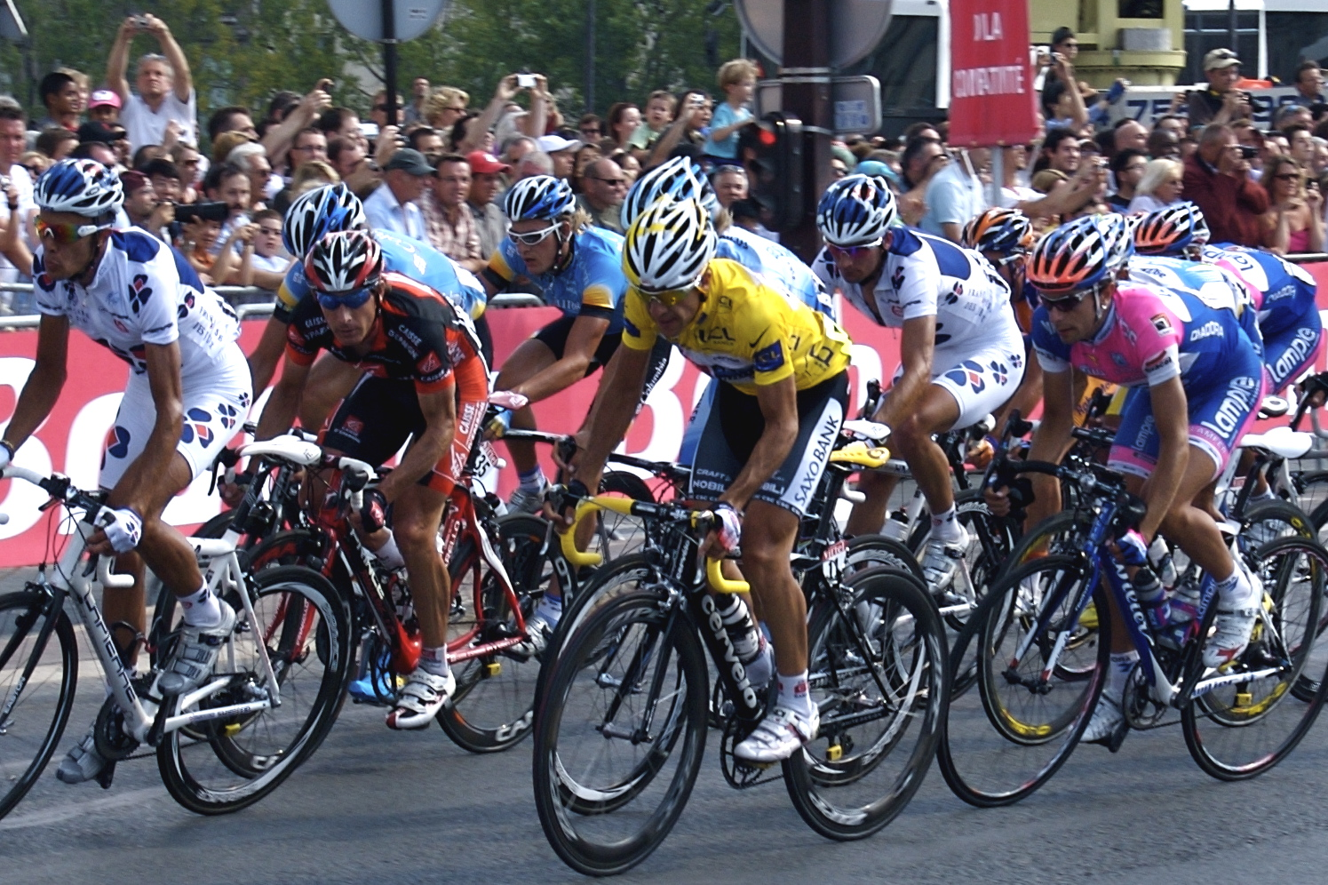 Avec le Maillot Jaune, on voit l'espagnol Carlos SASTRE en train de remporter son premier TOUR DE FRANCE, dans la dernière étape du Tour 2008 sur PARIS.